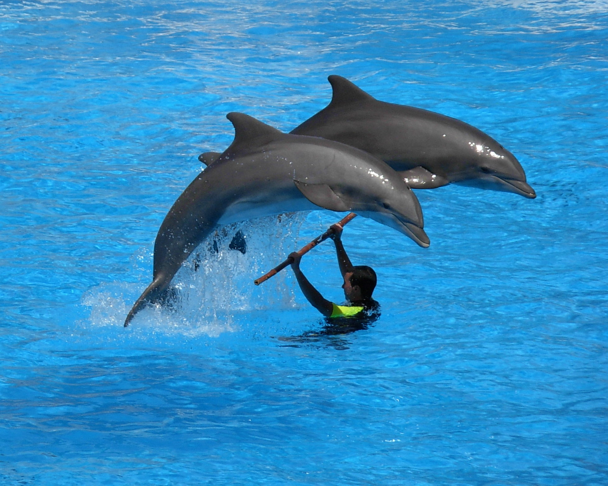 Dolphins at Loro Parque.